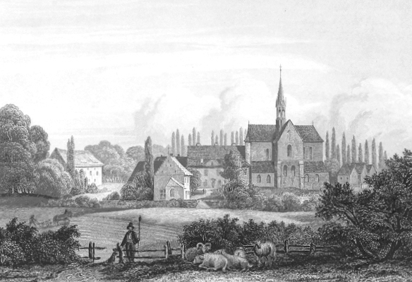 Kloster Loccum